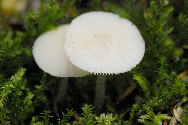 Marasmius wynnei from Commanster, Belgium.